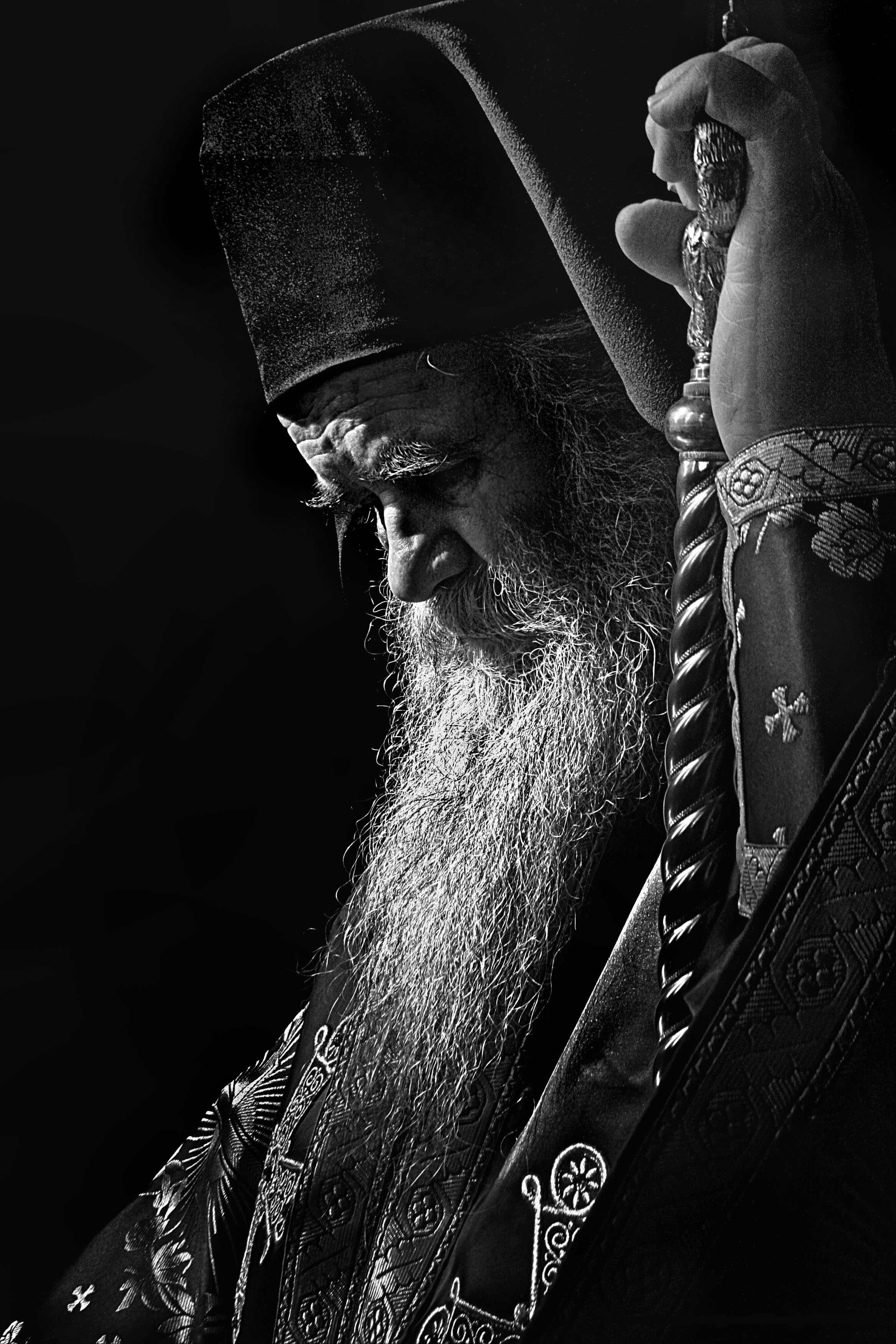 Митрополит Амфилохије.фото: Драган С. Танасијевић (по одобрењу Д.С.Танасијевића)